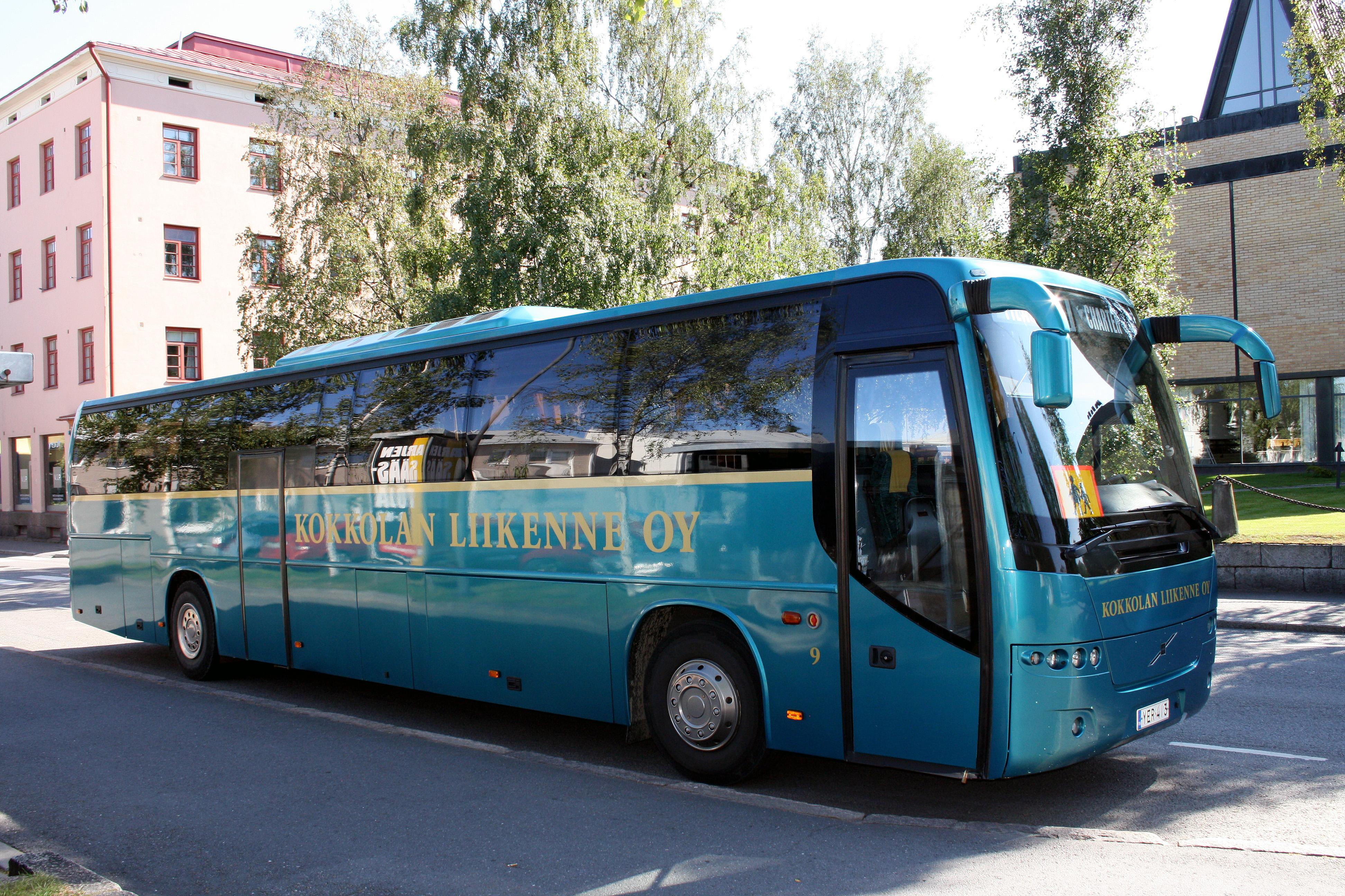 Kokkolan liikenteen tilausajossa oleva linja-auto.